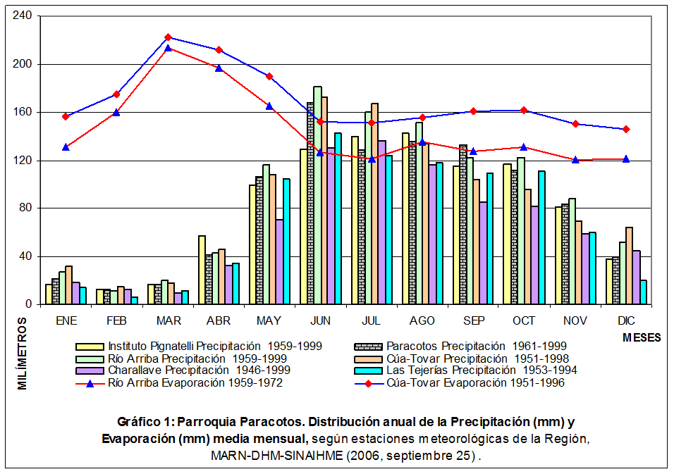 Gráfico 1: Parroquia Paracotos. Distribución anual de la Precipitación (mm) y Evaporación (mm) media mensual, según estaciones meteorológicas de la Región, MARN-DHM-SINAIHME (2006, septiembre 25) .